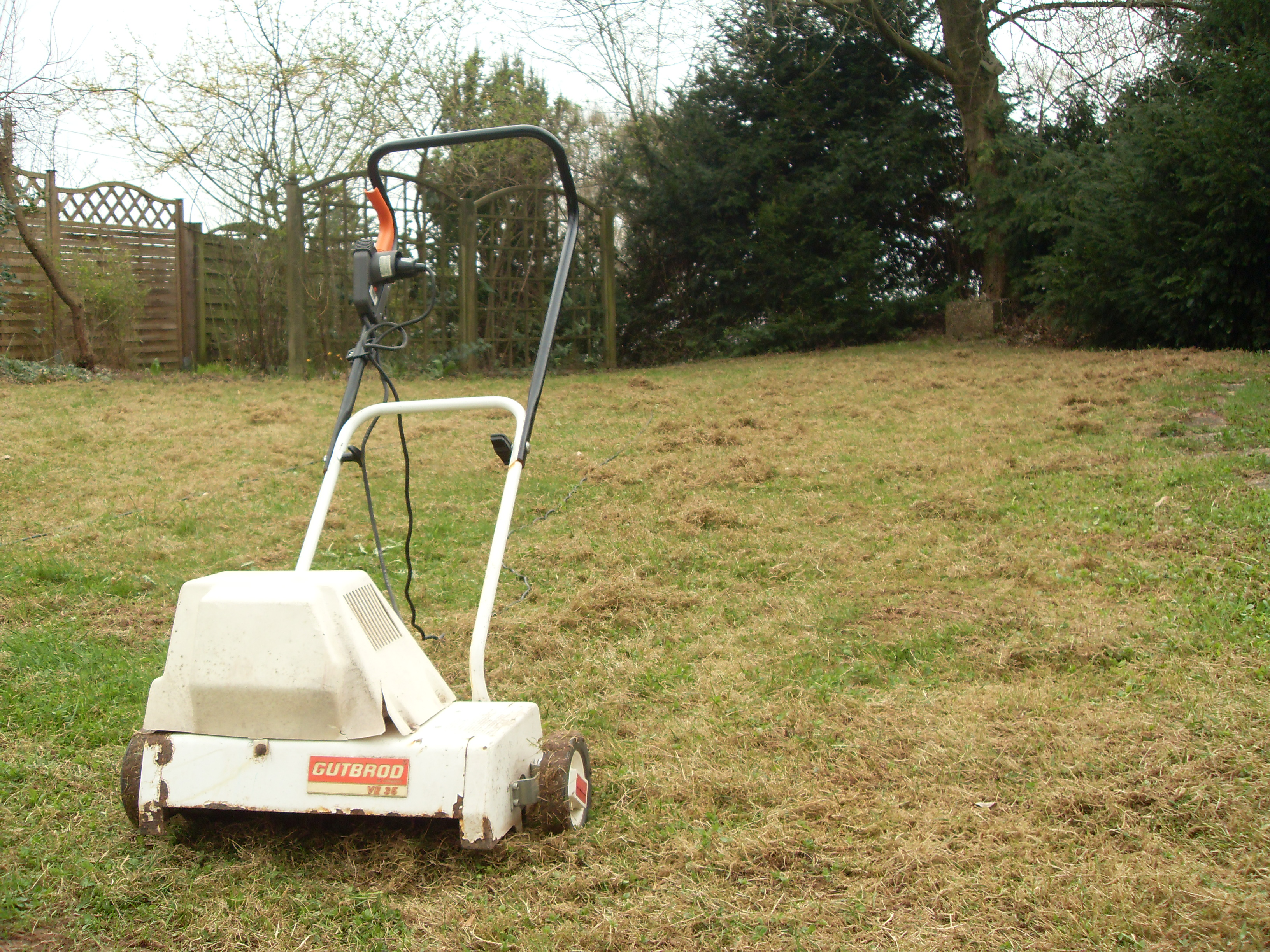 Weertykulator elektryczny